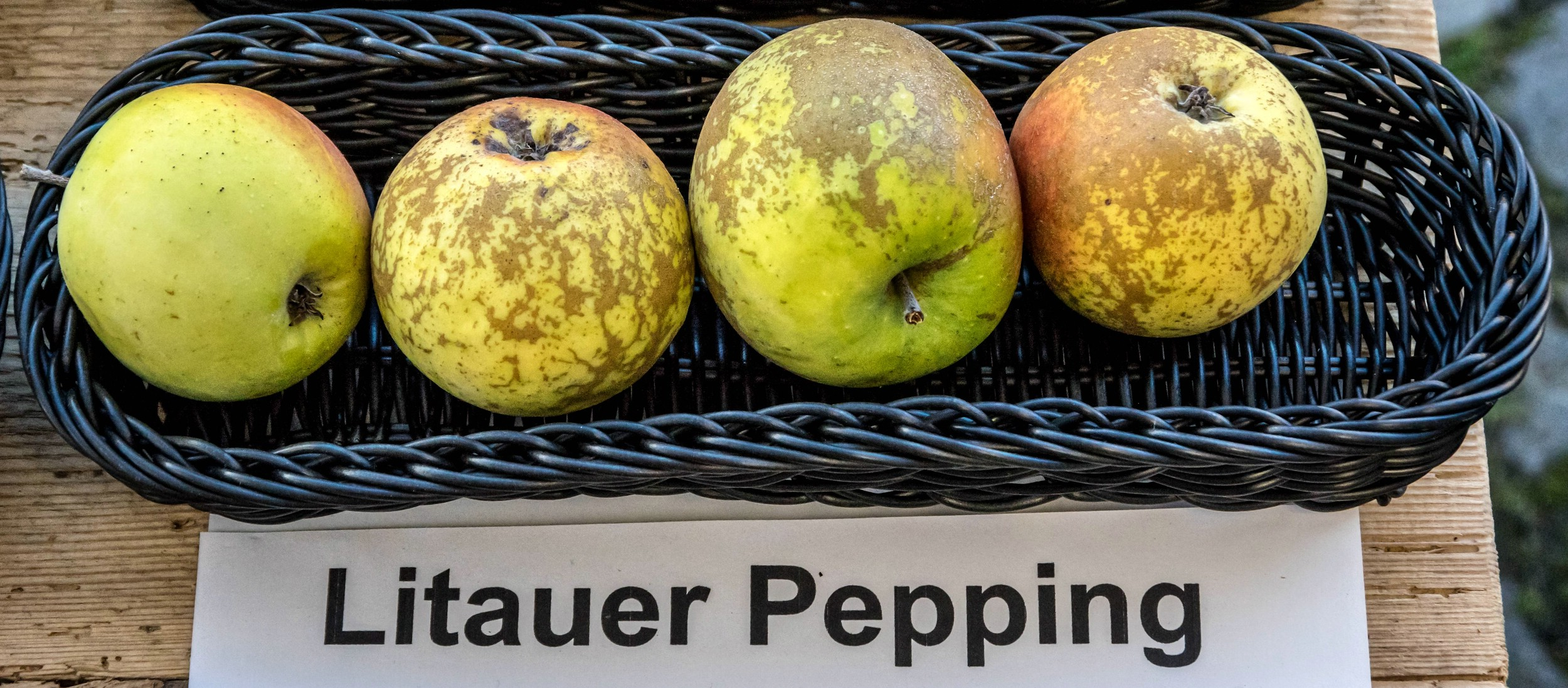 Alte Apfelsorten, von denen es im Badischen noch tragende Bäume gibt. Alle Aufnahmen au dem Oktober 2015